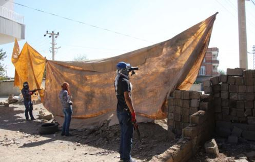 Yurtsever Devrimci Gençlik Hareketi (YDG-H) üyeleri özyönetim talebi nedeniyle açılan barikatların arkasında